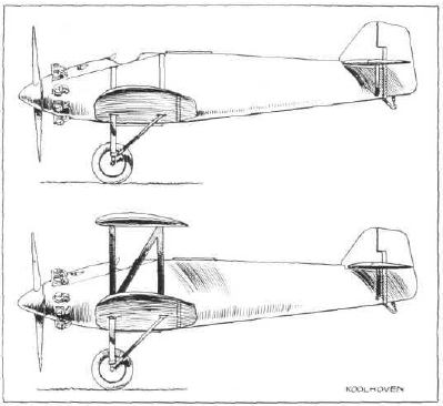 Esquema representativo de dos modelos del avión Koolhoven F.K.35 con motor Bristol Júpiter. El modelo de arriba representa la versión monoplano del avión, mientras que el de abajo representa al modelo biplano. Imagen publicada el 2 de diciembre de 1926 en la edición 936 de la publicación "Flight International" del Reino Unido.